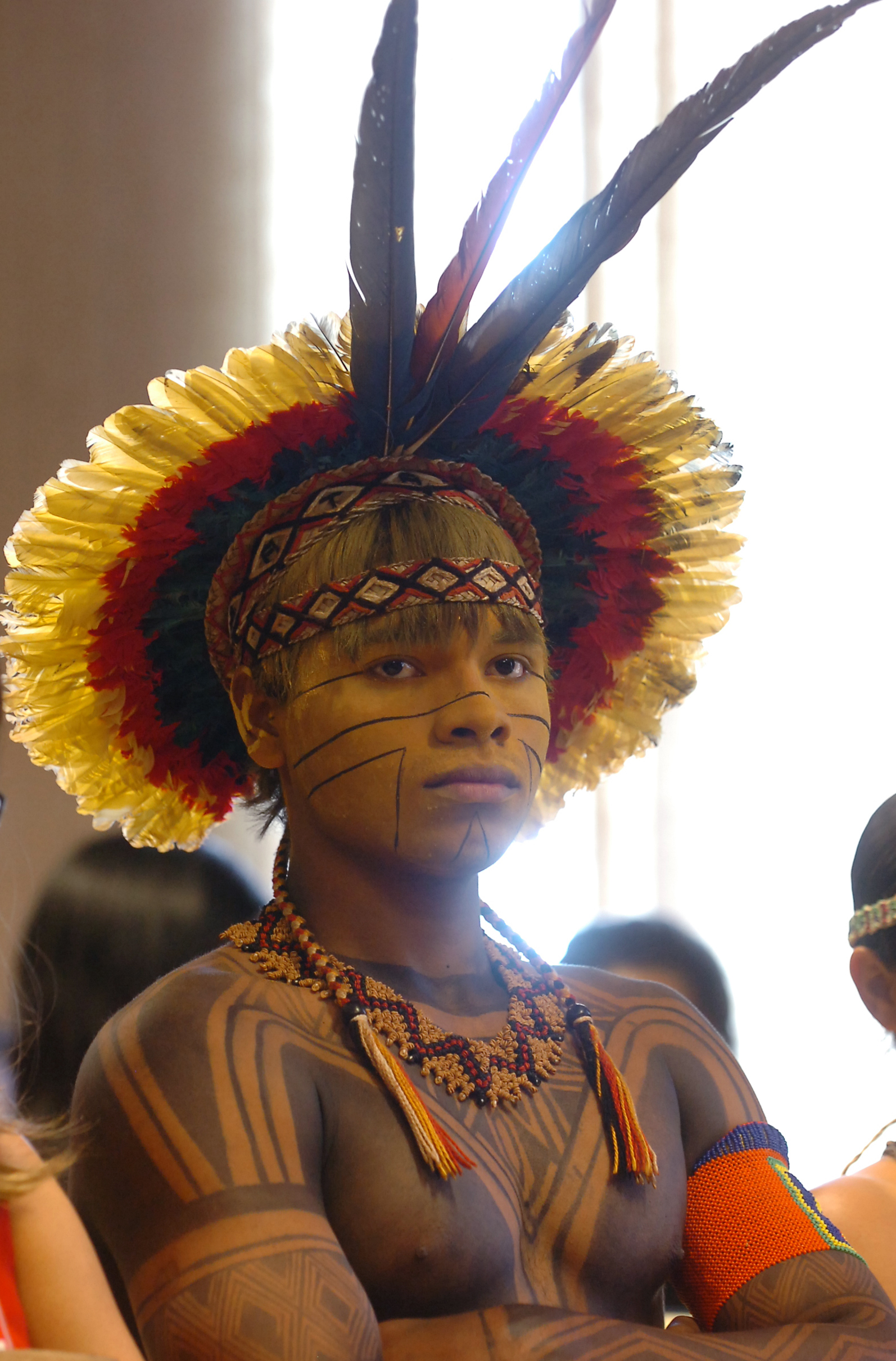 Brasília - Adolescente pataxó no 2º Encontro dos Povos da Floresta participa de cerimônia em que foi entregue ao Ministério da Educação um documento com reivindicações para que aumente o ensino bilíngüe nas aldeias